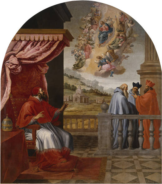 Visión del Papa Víctor IIIlabel QS:Les,"Visión del Papa Víctor III"